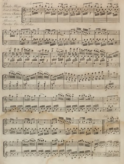 Premiera pagina de l'edicion de Jean-Henri Naderman deu cocnerto per arpa en Fa Major de Joan-Batista Krumpholtz, ambé lo ritornello dei Filhetas de Tolon